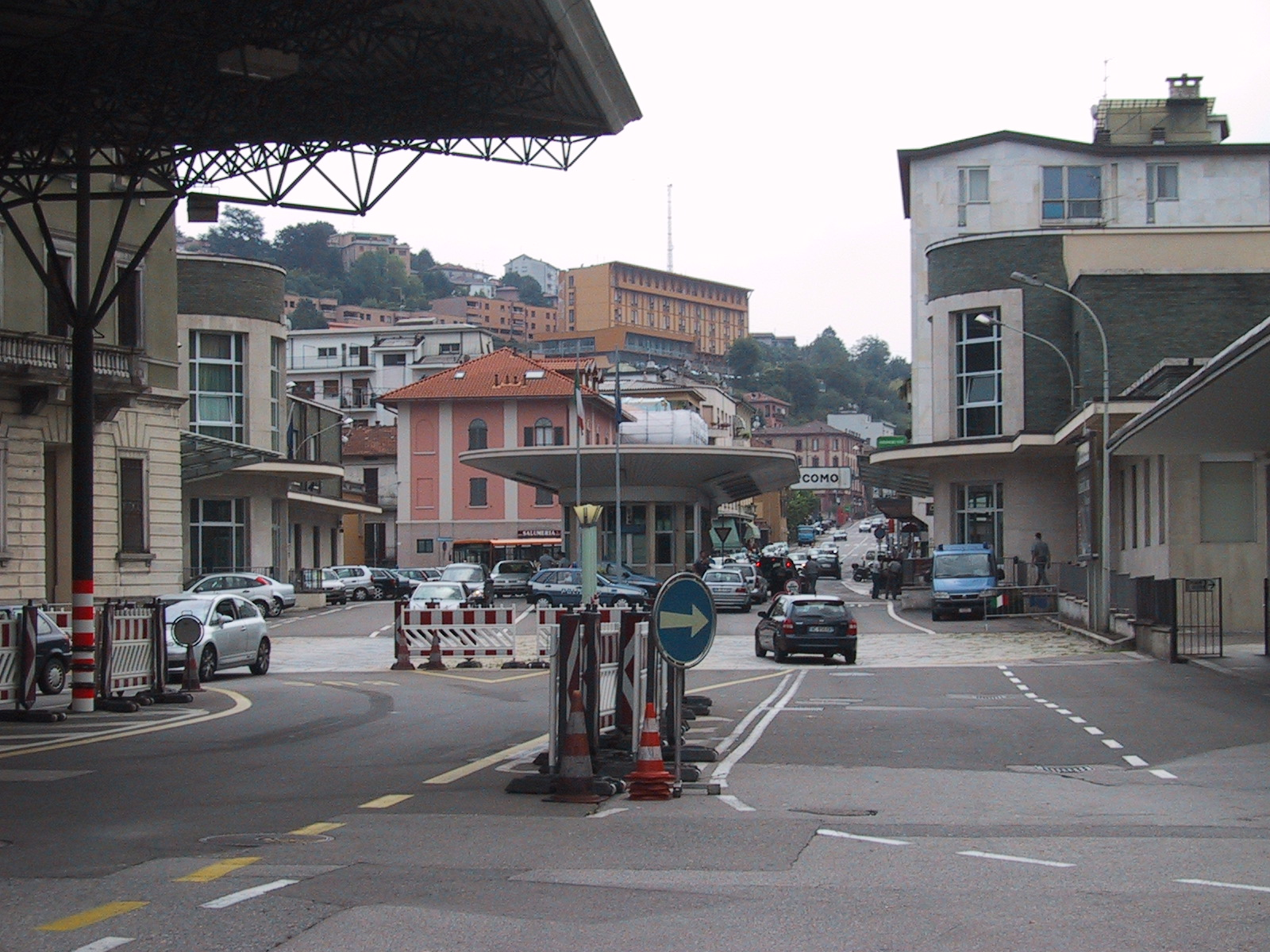 Zoll von Chiasso, Kanton Tessin, Schweiz